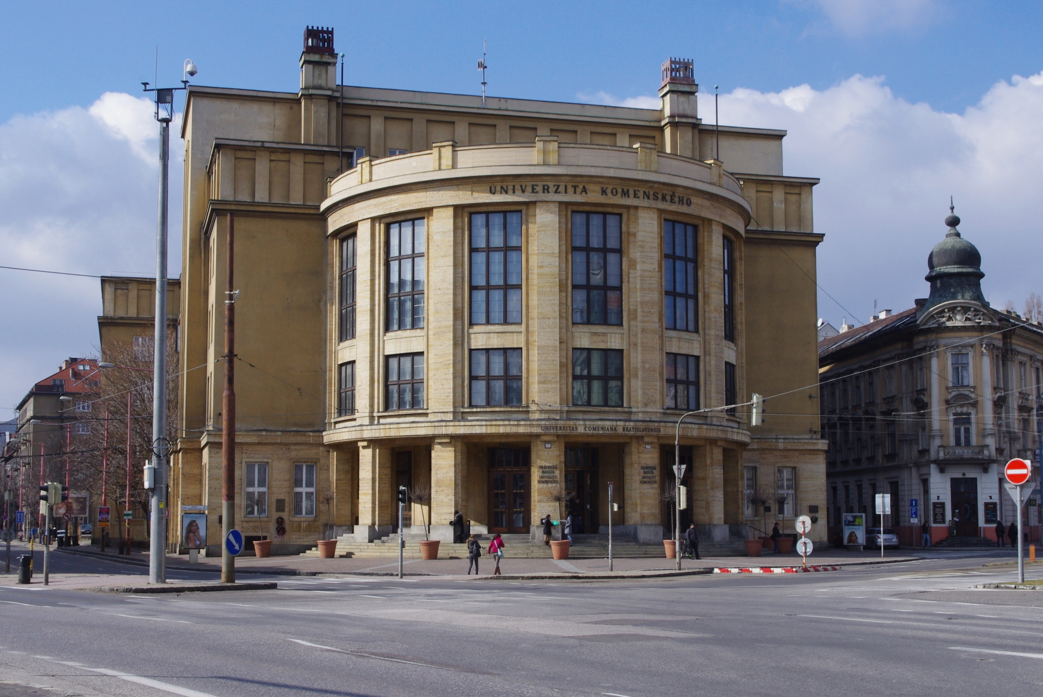 Univerzita Komenského